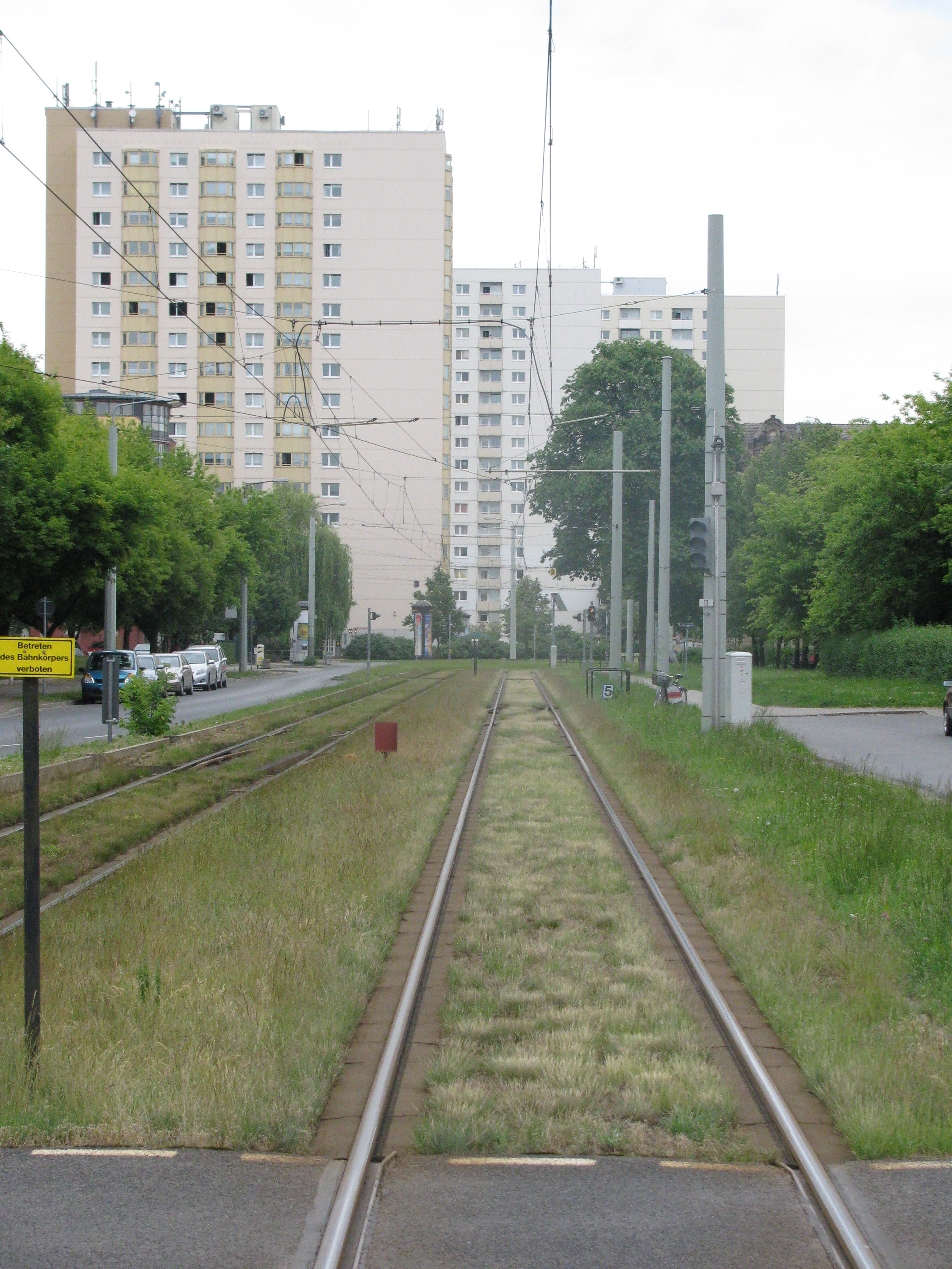 Blick entlang der Stübelallee auf das von Hochhäusern dominierte Zentrum des Stadtteils Gruna, Landeshauptstadt Dresden